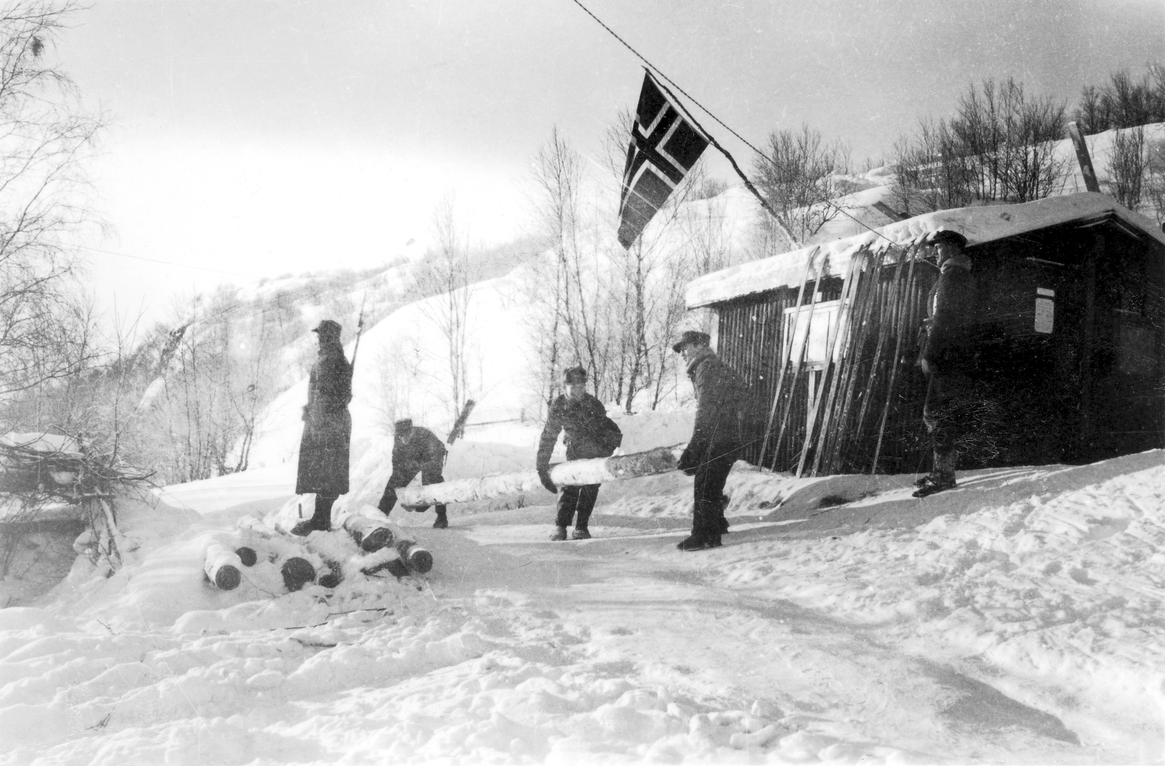 Format: Fotopositiv Dato / Date: 1940 Fotograf / Photographer: Kåre Hernes eller Trygve Gjervan Sted / Place: Skafferhullet, Finnmark Eier / Owner Institution: Trondheim byarkiv, The Municipal Archives of Trondheim Arkivreferanse / Archive reference: Tor.H42.B53.F3886 Fra Trygve B. Gjervans (1918 - 2004) samling. Gjervan var vernepliktig og tjenestegjorde ved Infanteriregiment 12 som holdt nøytralitetsvakt ved grensen til Sovjetunionen og Finland i Finnmark i 1940. Da tyskerne invaderte Norge 9. april ble IR 12 sendt sørover, og under general Carl Gustav Fleischer (1883 - 1942) ble de satt inn i det norske motangrepet ved Gratangen nær Narvik, hvor IR 12 led store tap. Fotograf er ifølge Gjervans notater hovedsakelig Kåre Hernes. Trygve Gjervans egen tekst til bildet: Fra utposten "Skafferhullet" like ved grensen. Arbeide med å lage sperringer.